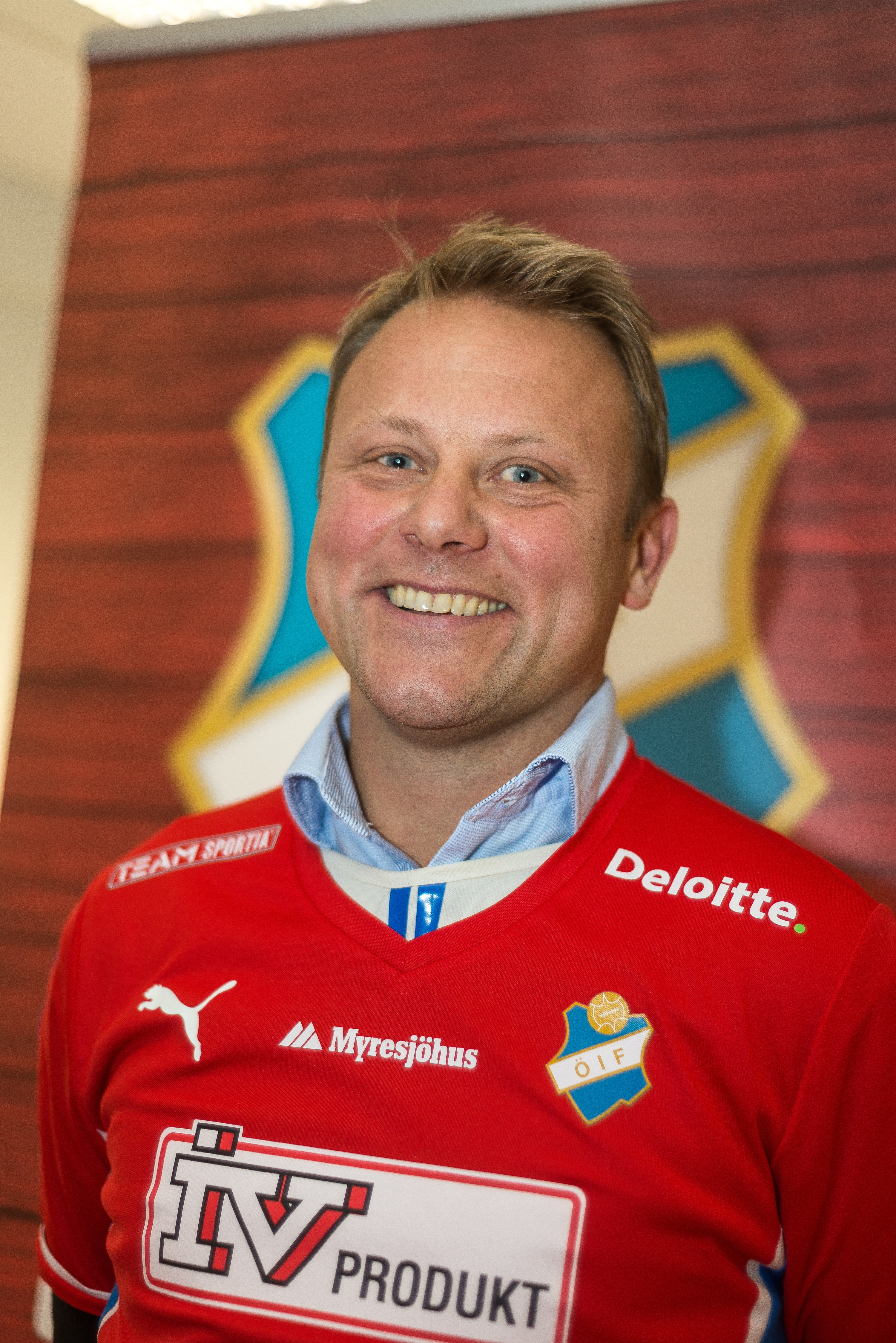 Roberth Björknesjö provar sitt nya lag Östers matchtröja, 30/12 2013.